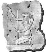 Heket vyobrazena na desce